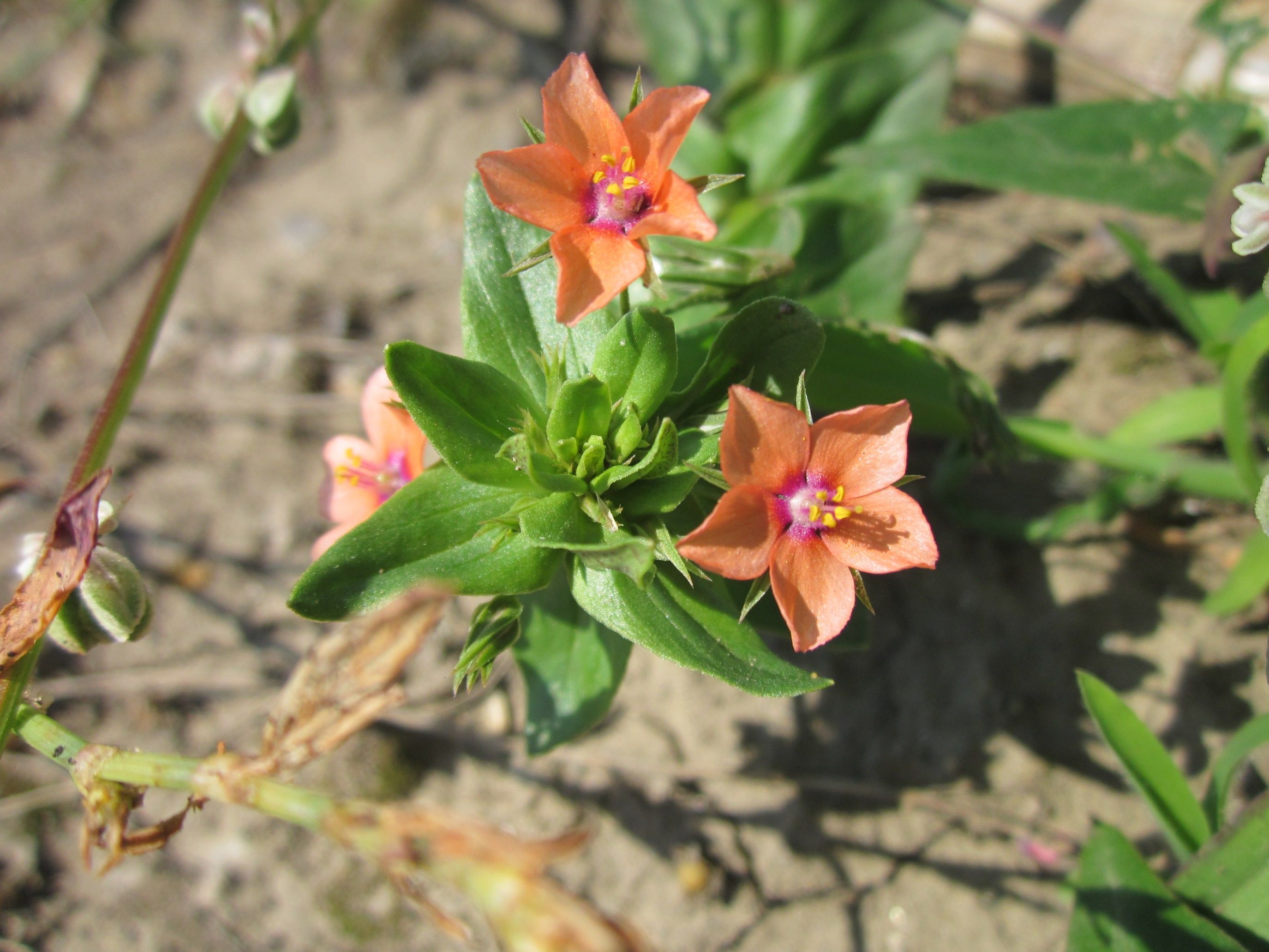 Acker-Gauchheil (Lysimachia arvensis) im Hockenheimer Rheinbogen